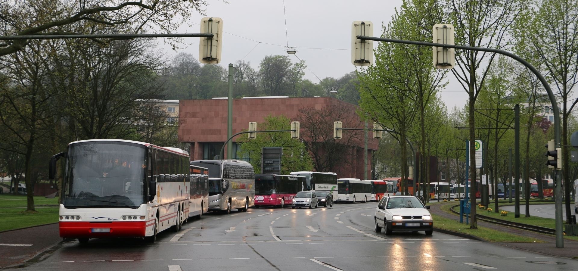 Der Bustransfer von der Bielefelder Innenstadt zum Hermannsdenkmal